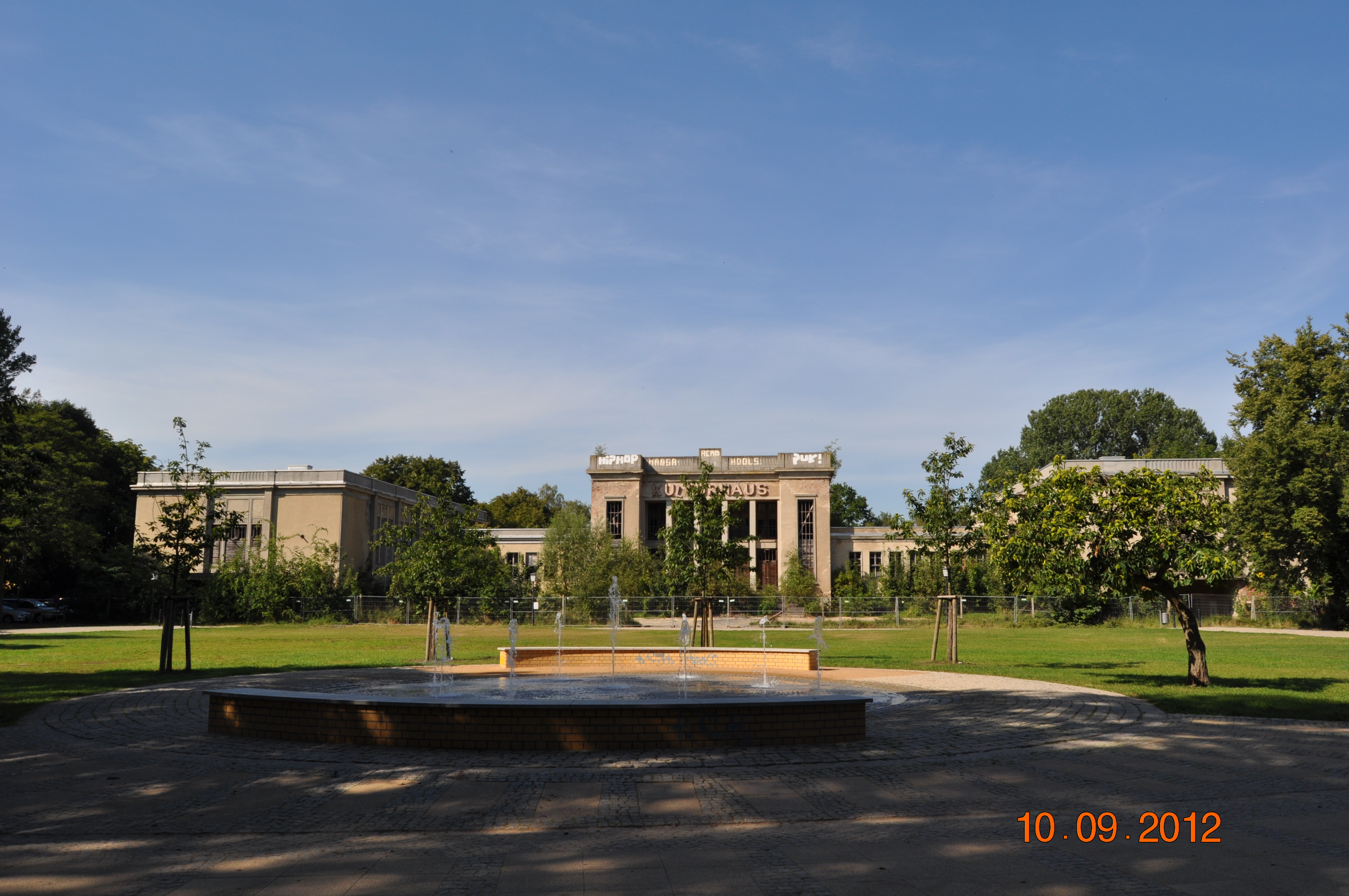 Kulturhaus Zinnowitz mit Anlagen